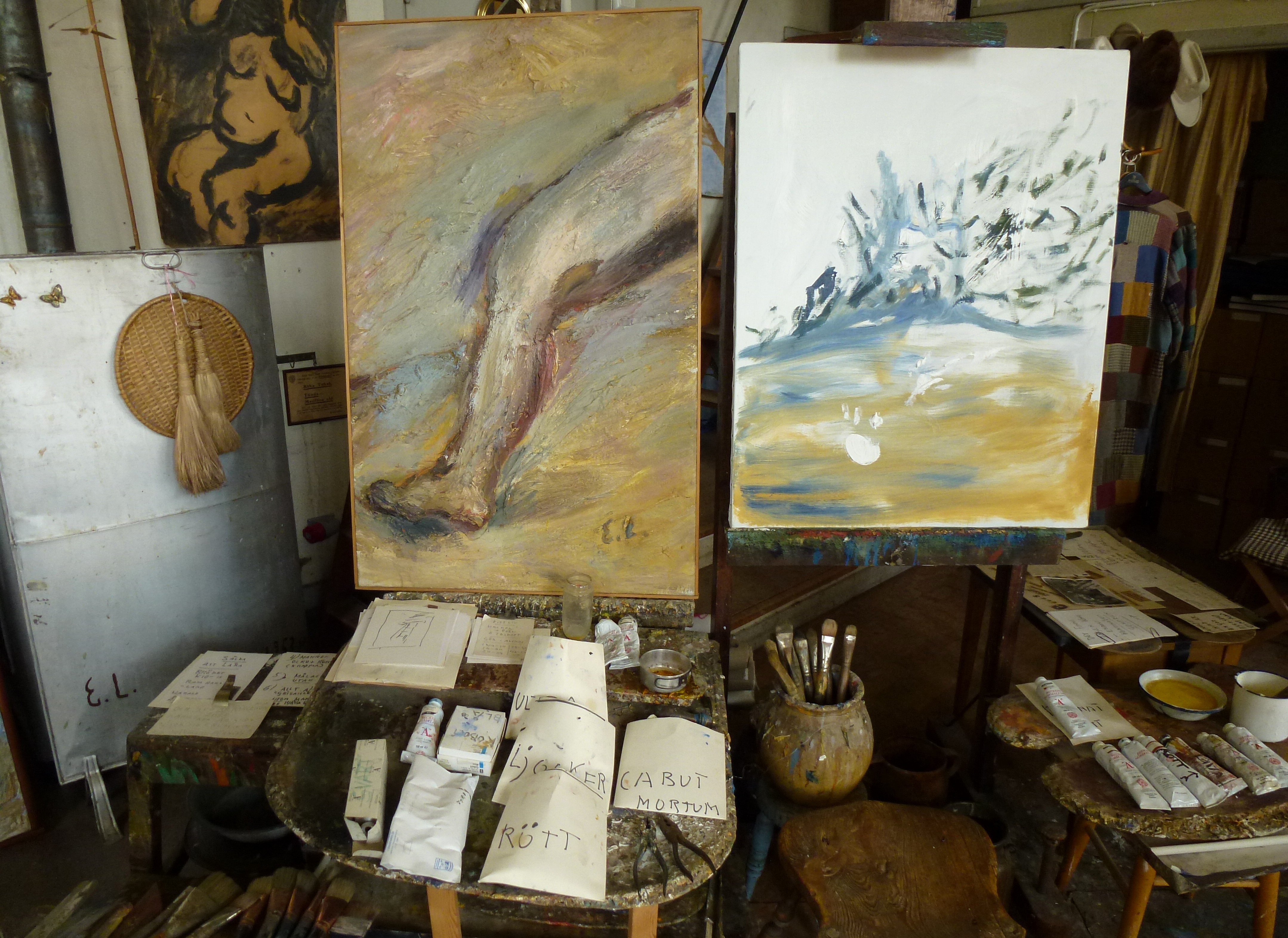 Evert Lundquists ateljé 2012